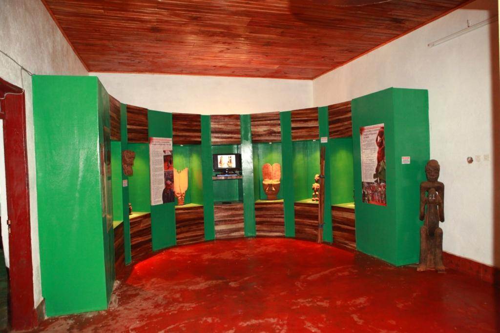 Salle d'exposition du musée communautaire de Bamendjinda (Cameroun) "Arts, traditions, esclavages"